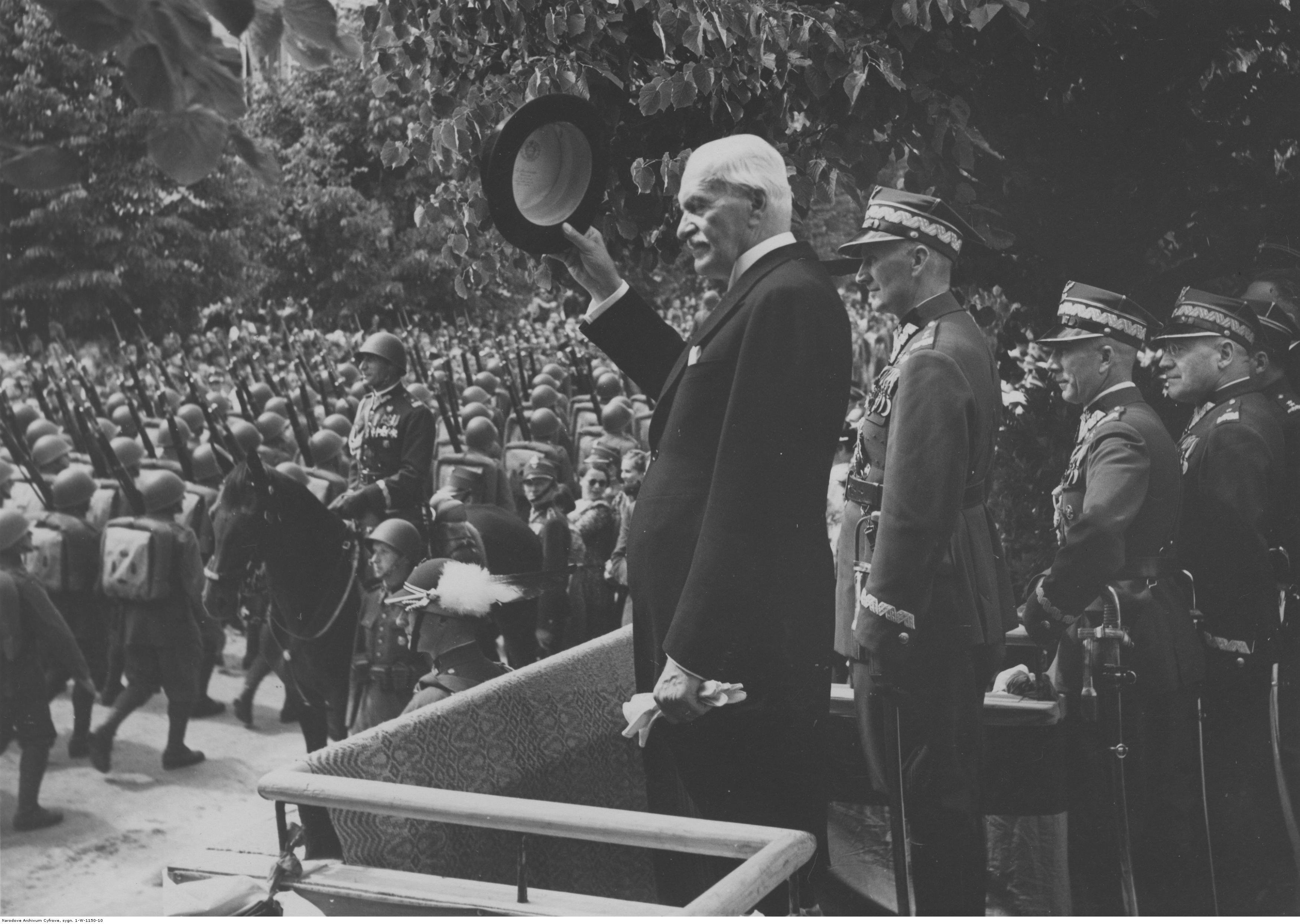 Jubileusz dwudziestopięciolecia 1 Dywizji Piechoty Legionów w Wilnie. Defilada - na trybunie od lewej: prezydent RP Ignacy Mościcki, gen. Stefan Dąb-Biernacki, gen. Mieczysław Norwid- Neugebauer, gen. Aleksander Litwinowicz. Na koniu gen. Wincenty Kowalski. Przed trybuną stoi adiutant prezydenta RP major Strzelców Podhalańskich Józef Hartman. Koncern Ilustrowany Kurier Codzienny - Archiwum Ilustracji. Sygnatura: 1-W-1150-10